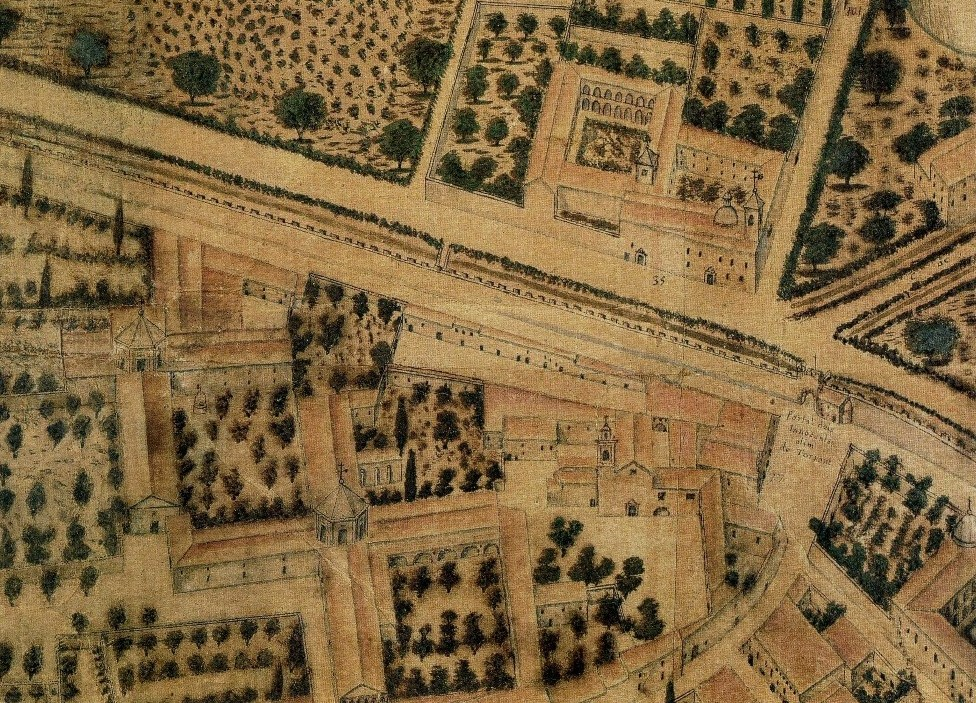 Vista del recinte de l'antic Hospital General de València, s'observa la crugia enderrocada i la conservada i l'església, també enderrocada. Plànol de Tosca de la ciutat de València de 1704.